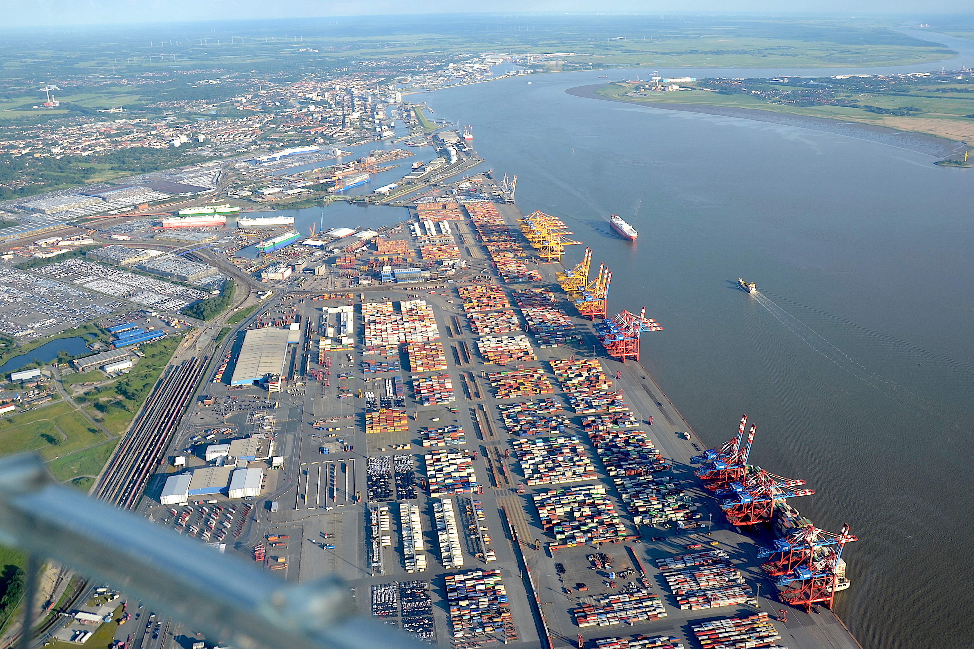 Container-Terminal Bremerhaven und Autoport (2019)